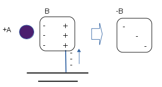 Izquierda: la proximidad del cuerpo cargado positivamente A separa las cargas del conductor B, al conectarlo a tierra, electrones libres son atraídos e incrporados al metal. Derecha: desconectamos el conductor, el cual queda cargado con los electrones capturados, que se distribuyen por todo el volumen.